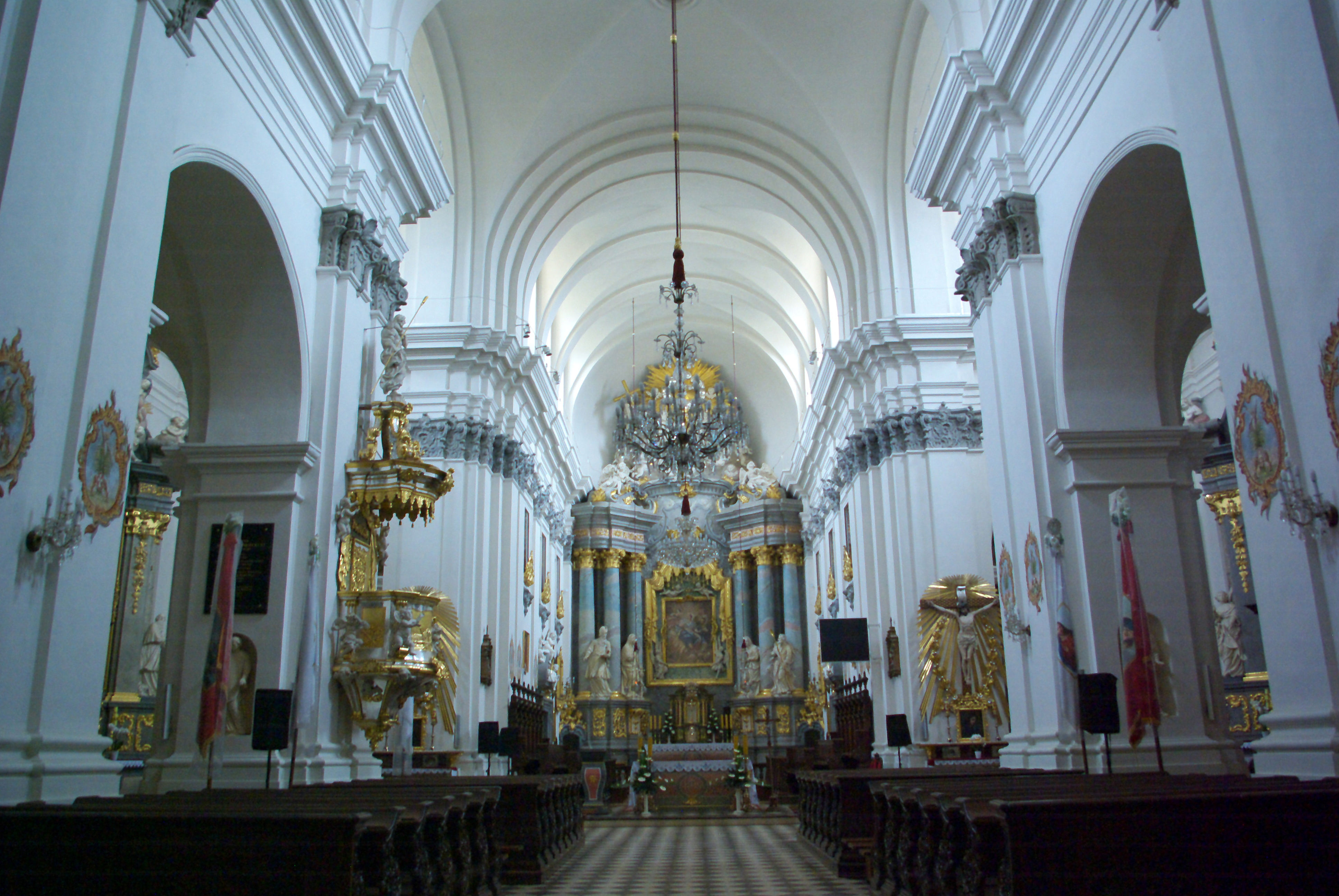 Bazylika Wniebowzięcia Najświętszej Maryi Panny w Starej Wsi (2017).